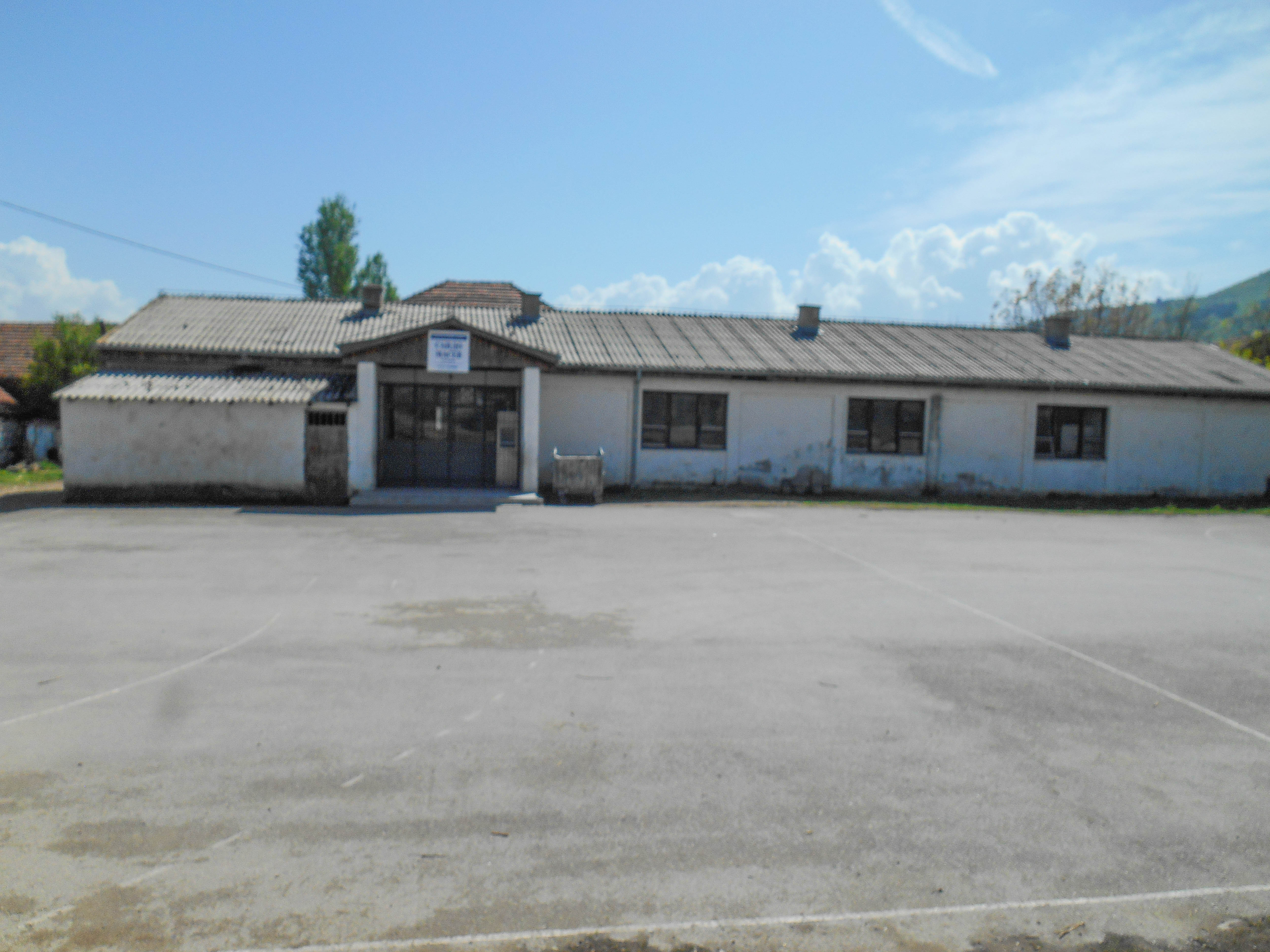 Училиште Сандо Масев